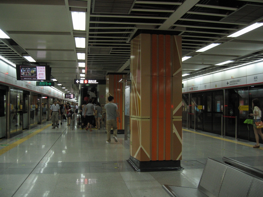 深圳地铁福民站站台